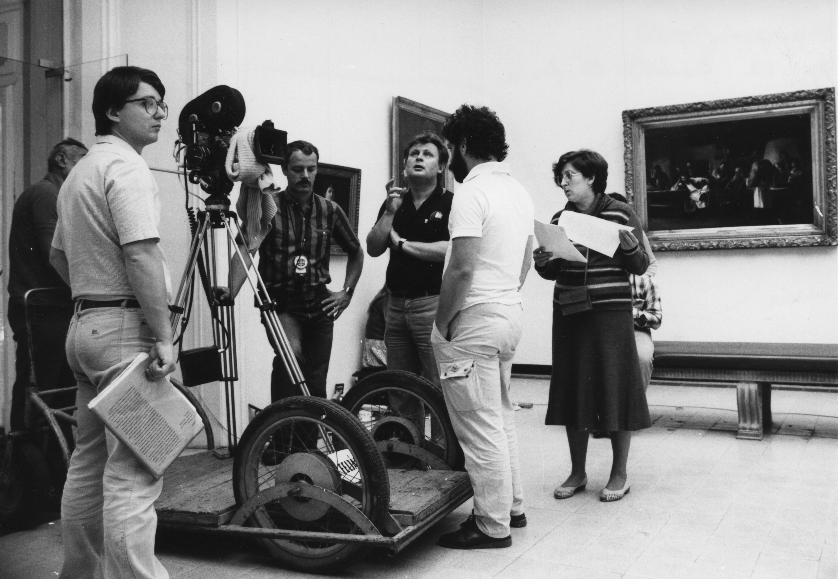 a Debreceni Déri Múzeum című TV-film forgatásán. Szokolai Tamás rendezőasszisztens, Szirmai Béla operatőr, Soós Árpád rendező, Hollai Iván segédoperatőr, Ézsiás Anikó szerkesztő. A háttérben Munkácsy Mihály Búsuló betyár c. képe (1893). Location: Hungary, Debrecen Title: a Debreceni Déri Múzeum című TV-film forgatásán. Szokolai Tamás rendezőasszisztens, Szirmai Béla operatőr, Soós Árpád rendező, Hollai Iván segédoperatőr, Ézsiás Anikó szerkesztő. A háttérben Munkácsy Mihály Búsuló betyár c. képe (1893).